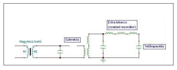 Magnifier kapcsolási rajza